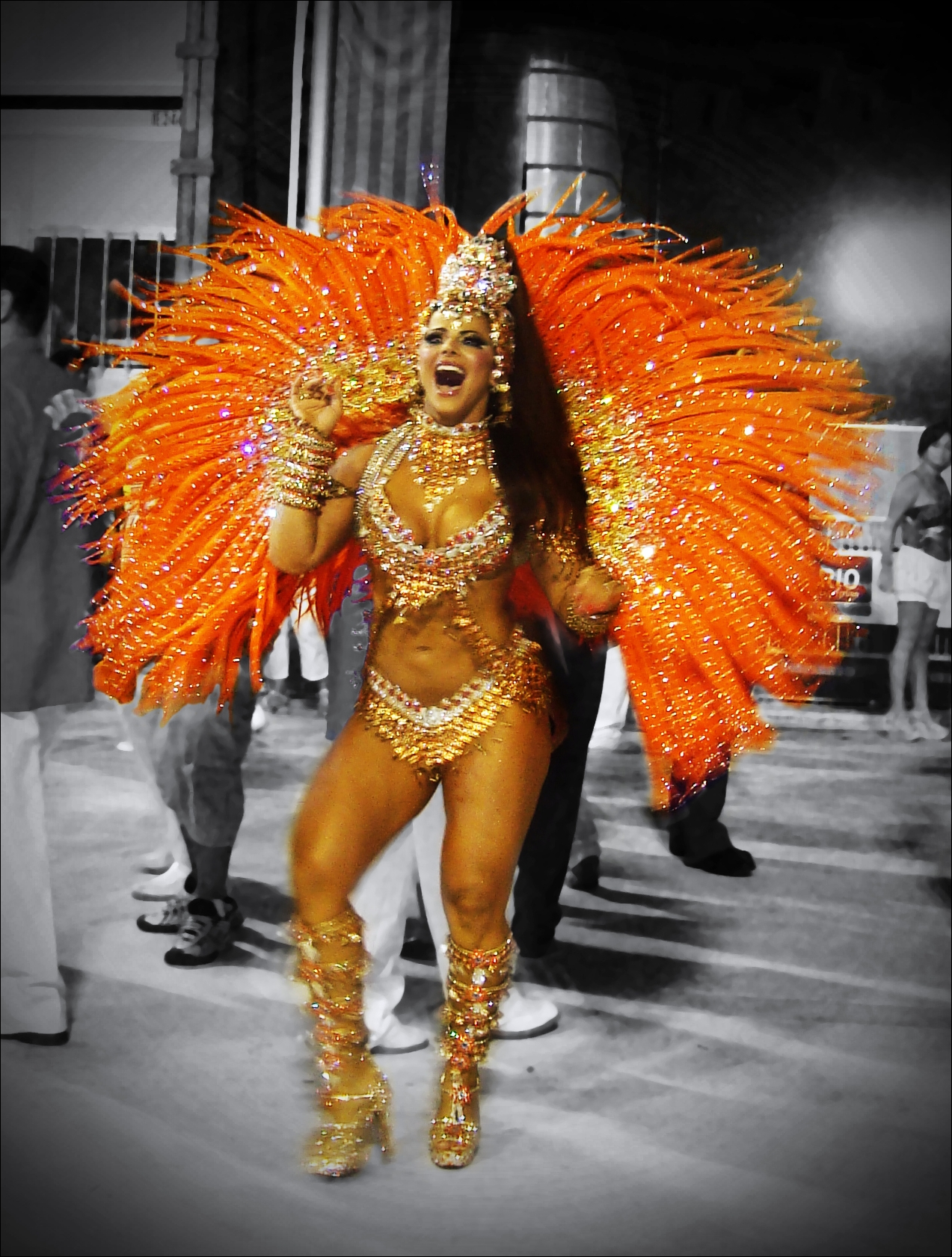 Desfile das Campeãs - Salgueiro. Fantasia: Sherazade, personagem de “As mil e uma noites” que tem o desafio de contar histórias para o sultão para não morrer. 044/365. Equipment: Sony Cyber-shot DSC-W125 View On Black / View On White 044.2/365 - corte diferente. View On Black / View On White